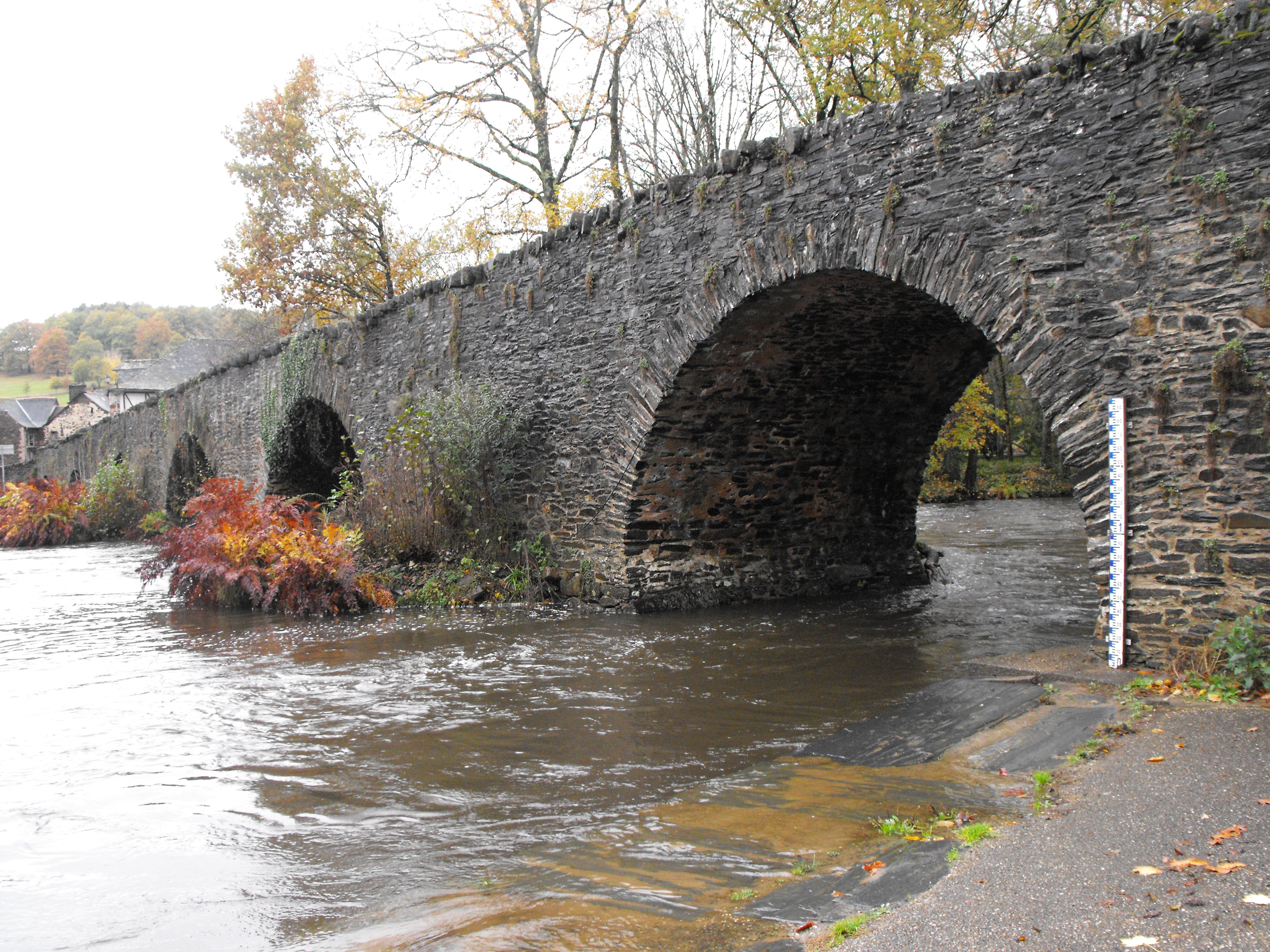 Le vieux pont du Saillant sur la Vézère, le 12 novembre 2010, entre Allassac (au premier plan) et Voutezac (sur l'autre rive), Corrèze, France.